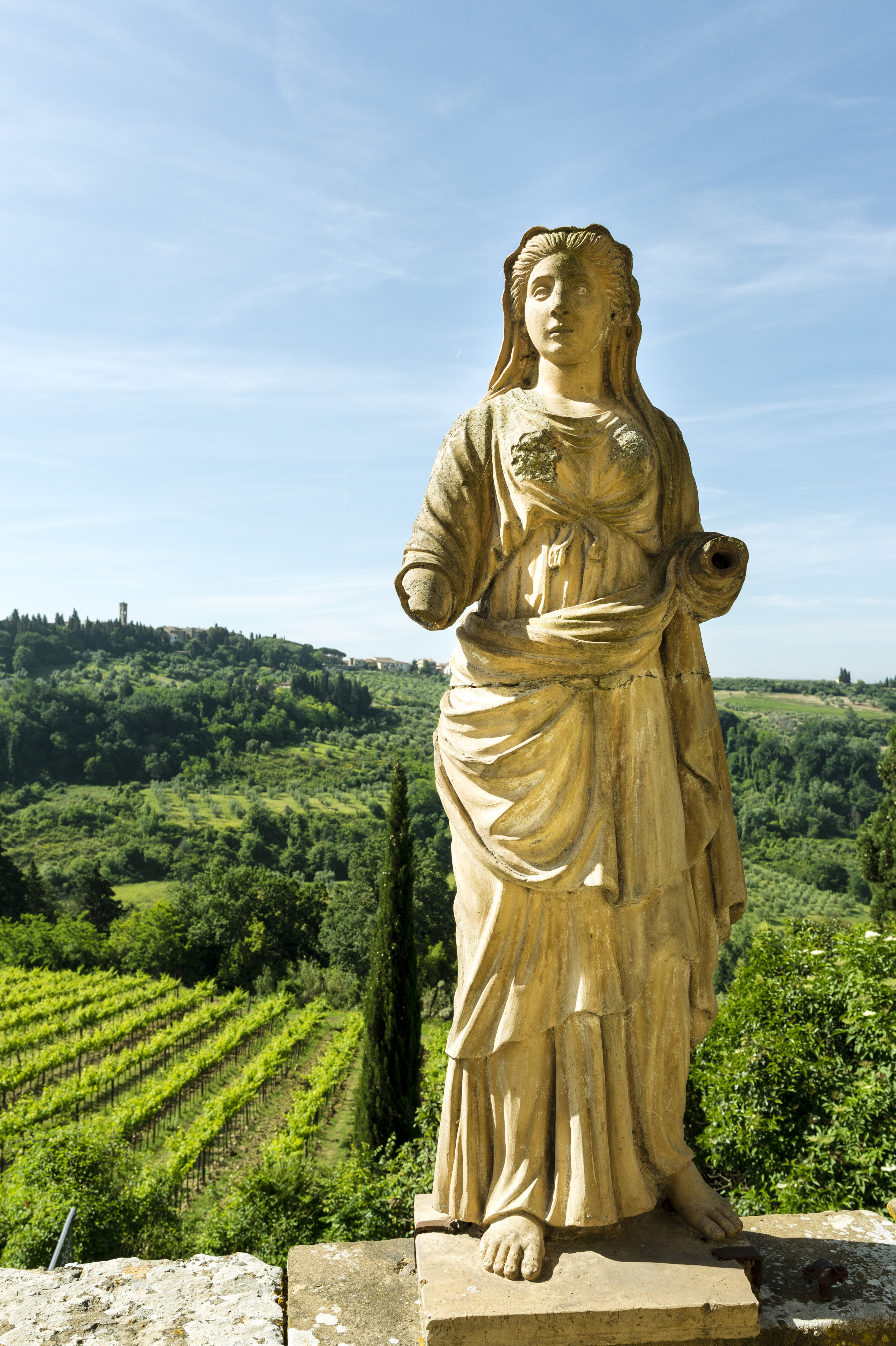 Statua del giardino danneggiata durante i bombardamenti. Sullo sfondo si vede la chiesa di Barberino Val d'Elsa.